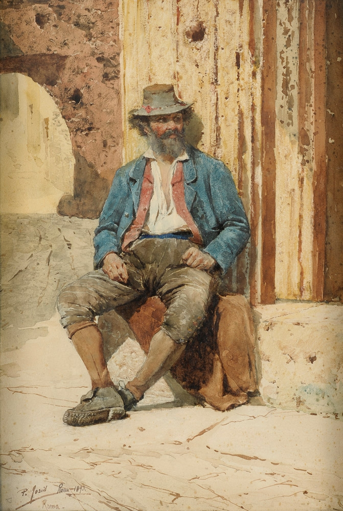 Siesta. Signiert. Aquarell. Datiert: Roma 1893. 52 x 35 cm.